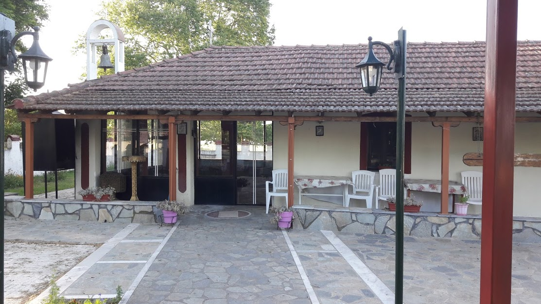 Άγιος Γεώργιος Πετρωτού